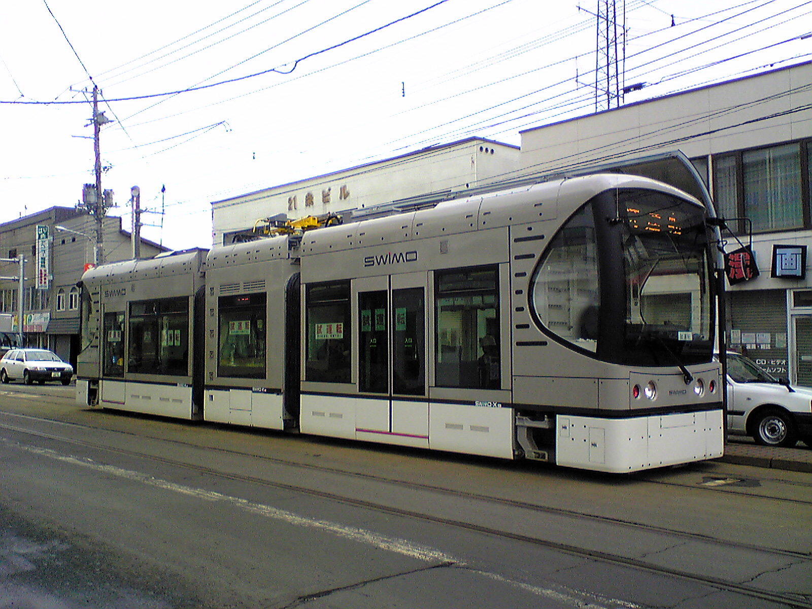 SWIMO（川崎重工の試験車両）